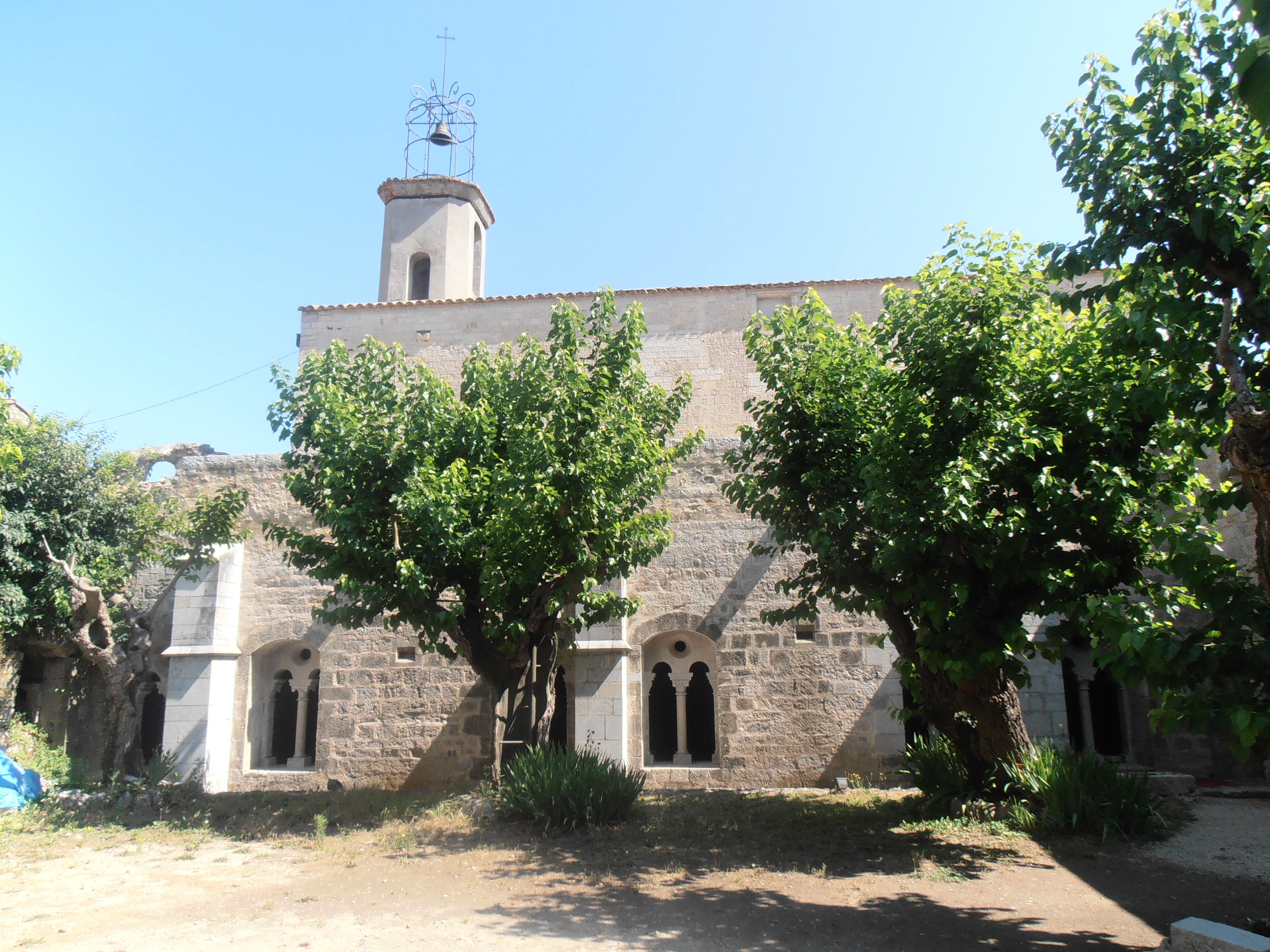 Département du Var, Abbaye de la Celle propriété du Conseil général du Var depuis 1990. Important témoignage de l'art roman provençal. Construte entre la seconde moitié du XIIe siècle et la première moitié du XIIIe siècle.